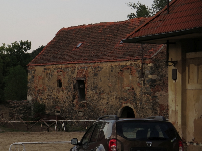 Tvrz, v areálu čp. 1, Netunice.